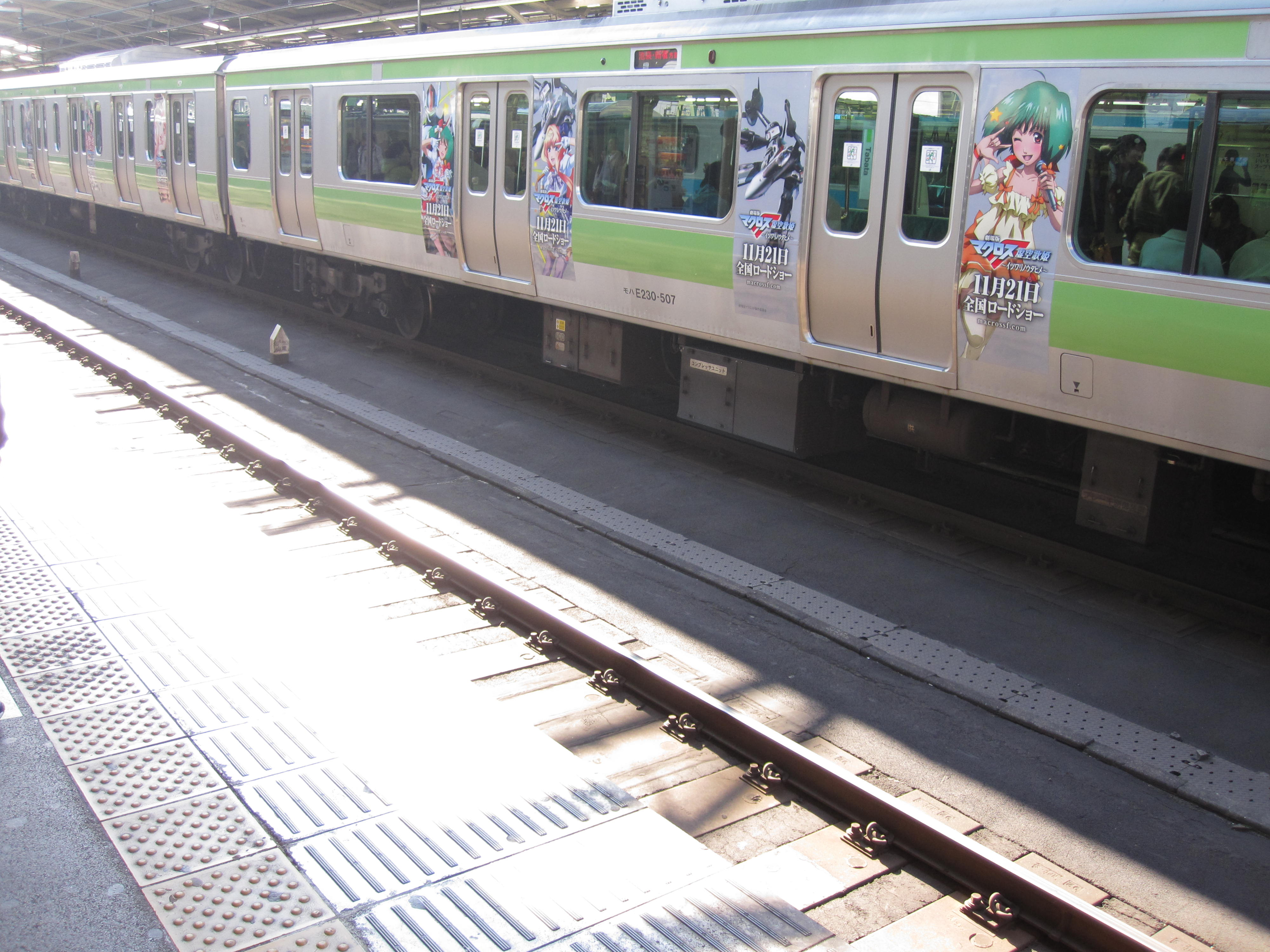 山手線 マクロスF 虚空歌姫仕様